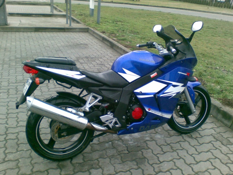 Zeigt eine Roadwin R F.I kurz nach dem Waschen auf der Shelltankstelle in Dessau-Roßlau